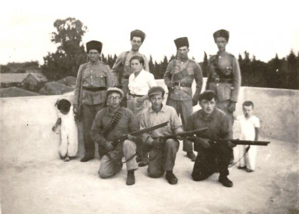 אנשי ההגנה בגן-שמואל במסווה של נוטרים בצבא הבריטי מאמנים את חברי הקבוץ בנשק על גג בית הקומותיים השני 1936-7